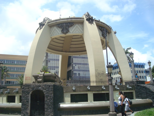 Templo de la Música en el Parque Central de San José, Costa Rica. 2013.